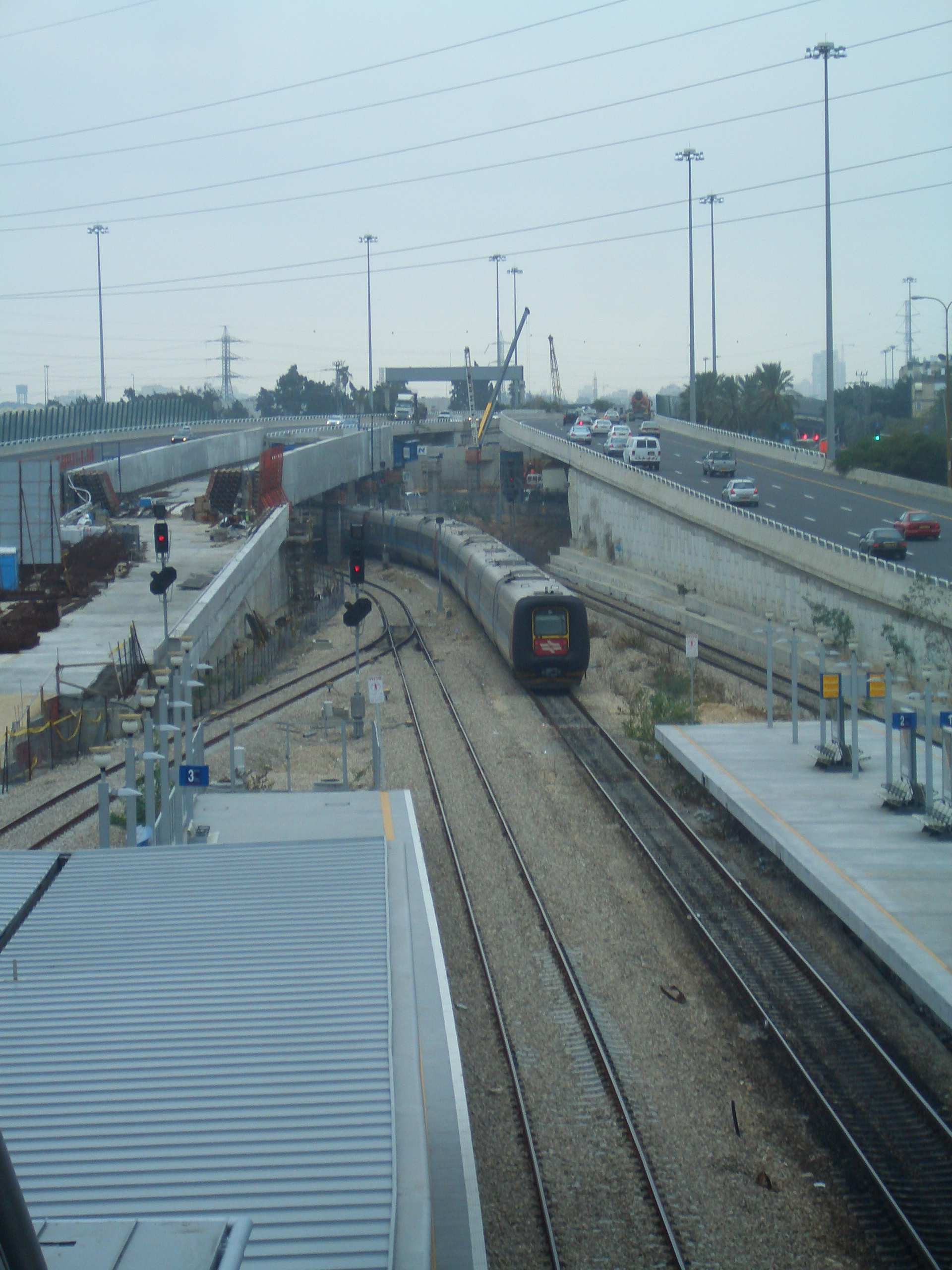 Zug der Israel Railways fährt, von Lod kommend, in den Bahnhof Tel Aviv-haHagana ein